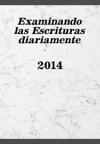 Examinando las escrituras diariamente 2014